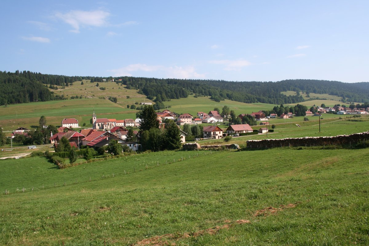 Verrières-de-Joux photo by Jeffdelonge